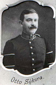 Otto Sykora (1873-1945)